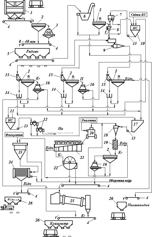 Схема